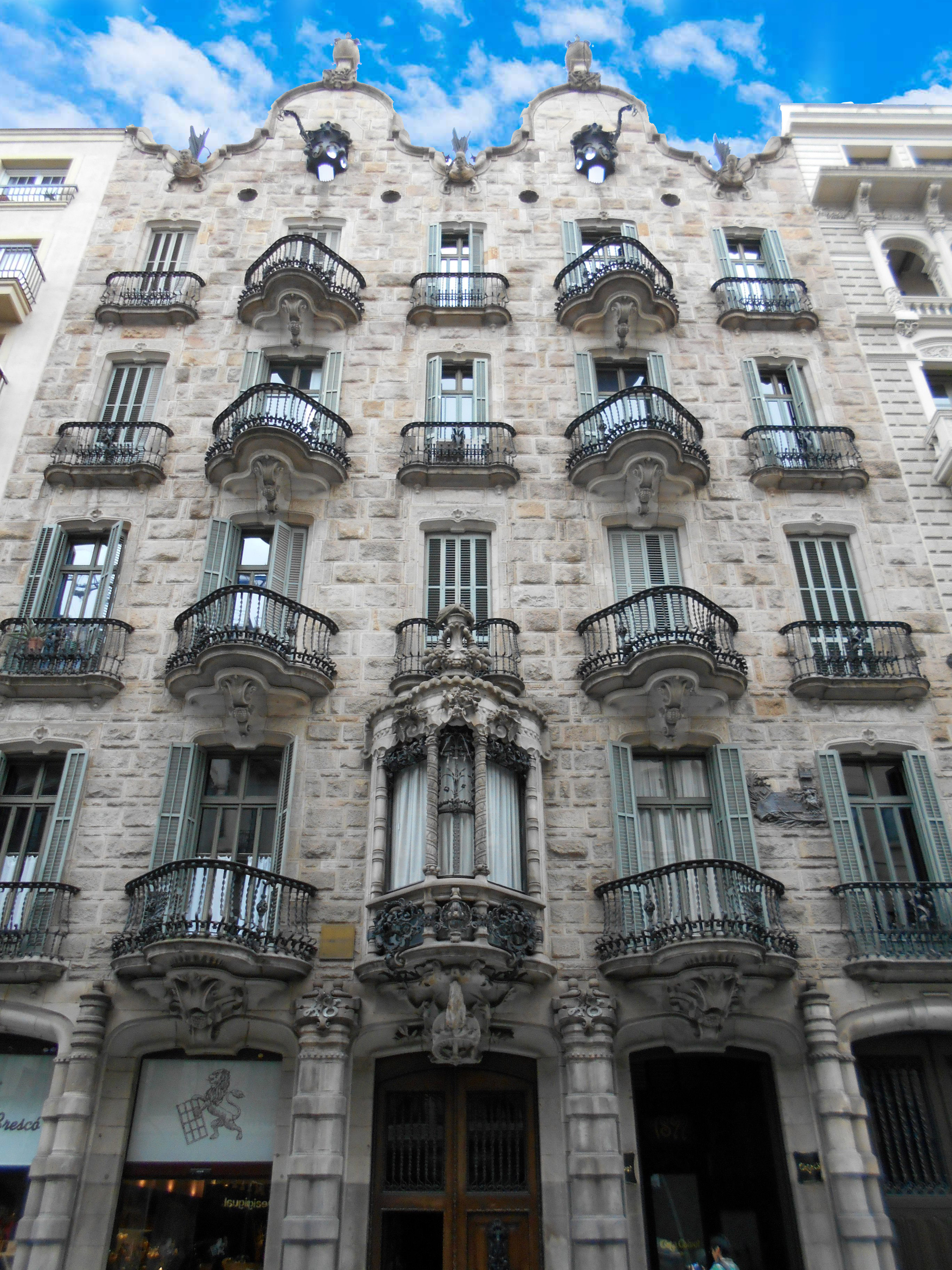 Casa Calvet.